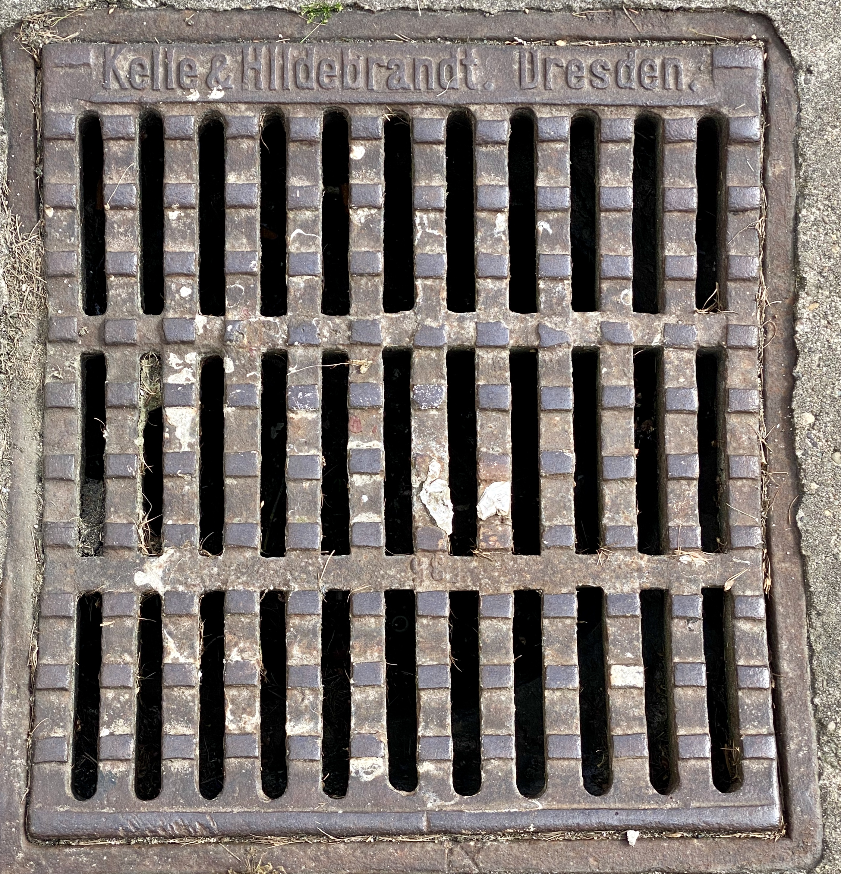 Kelle & Hildebrandt Abfluss in Bad Liebenwerda